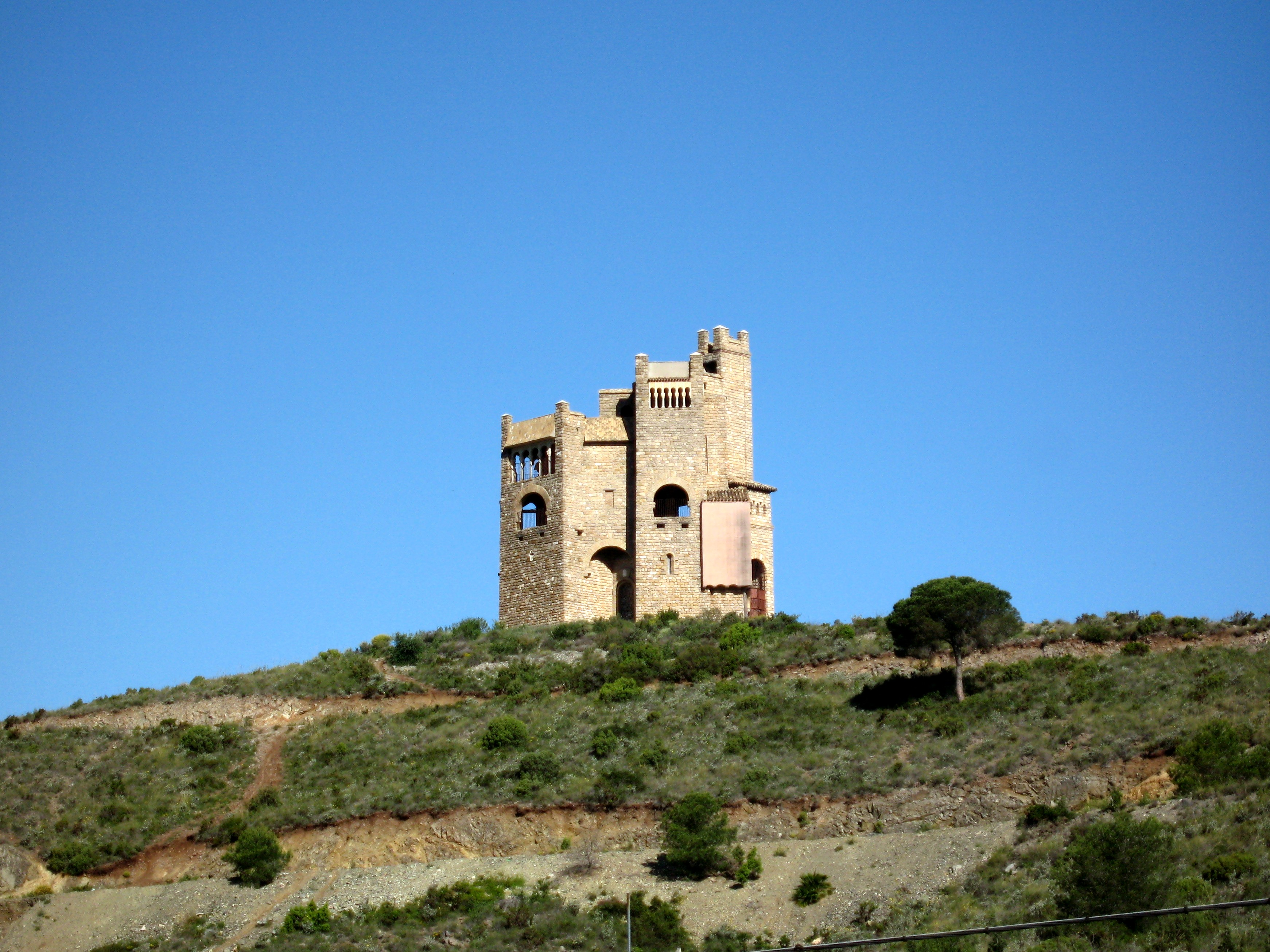 Alhaurín el Grande, Málaga, Andalucía (Andalusien), España (Spanien)